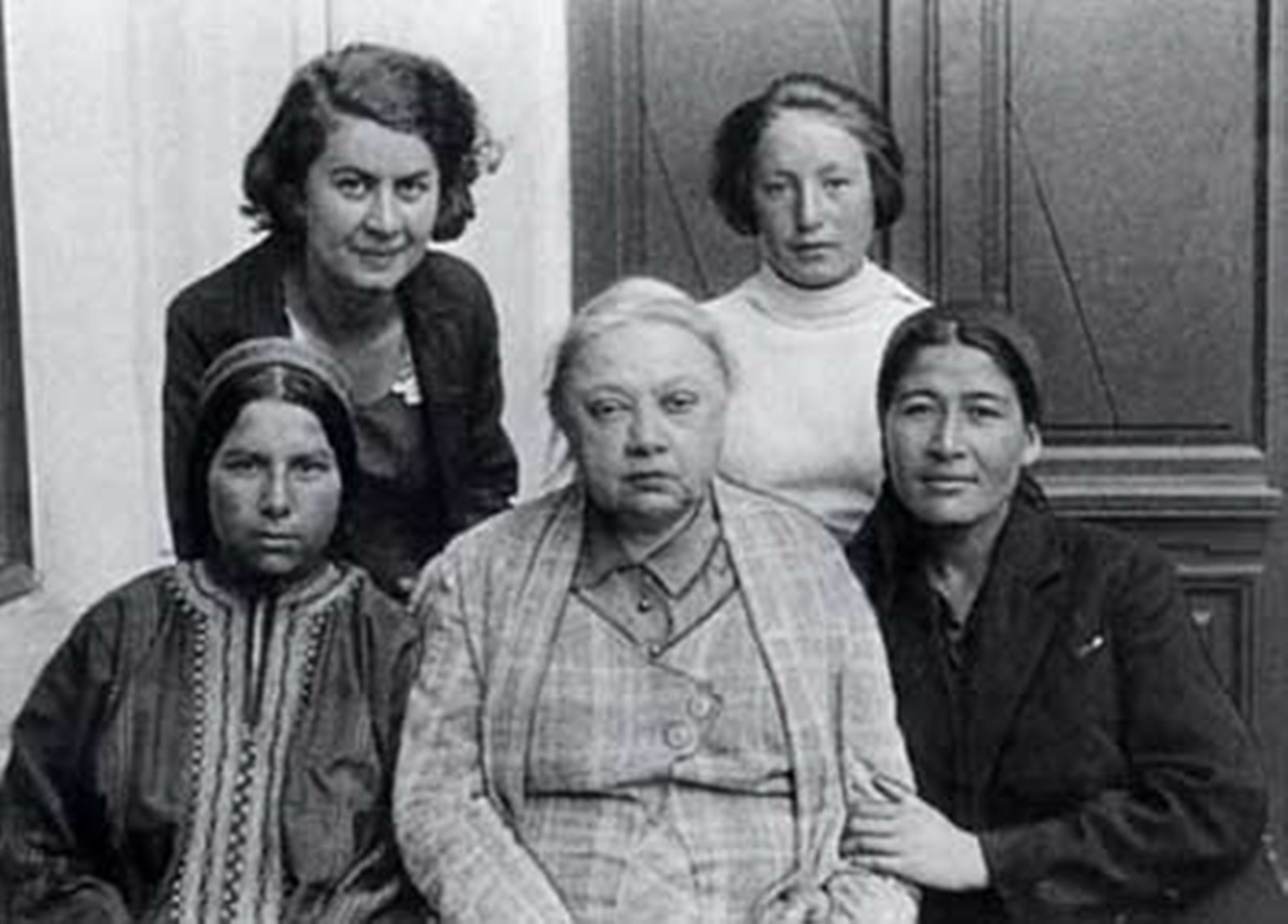 N. K. Krupskaya